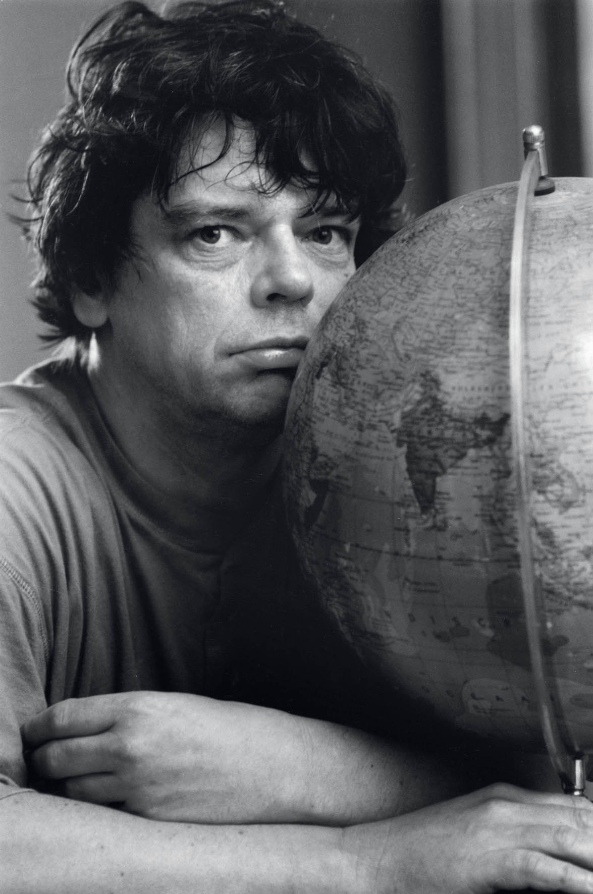 Boudewijn Büch, Nederlands schrijver.